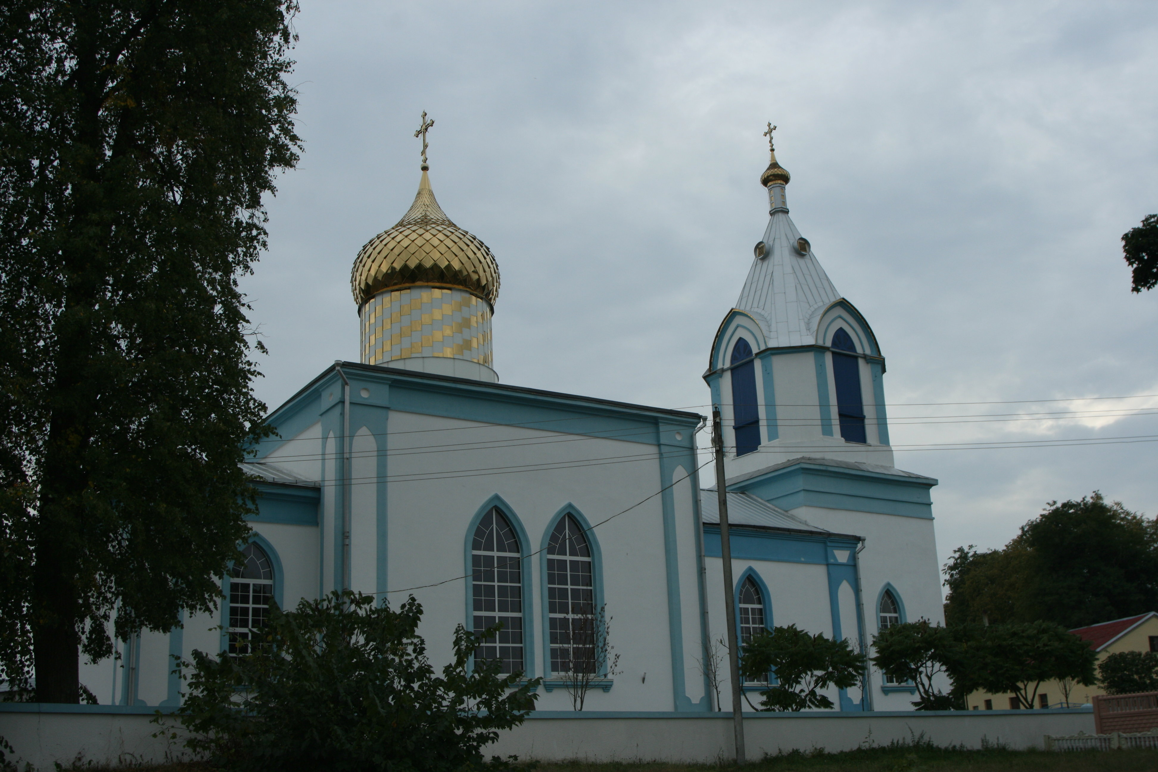 Aliekšycy, Belarus